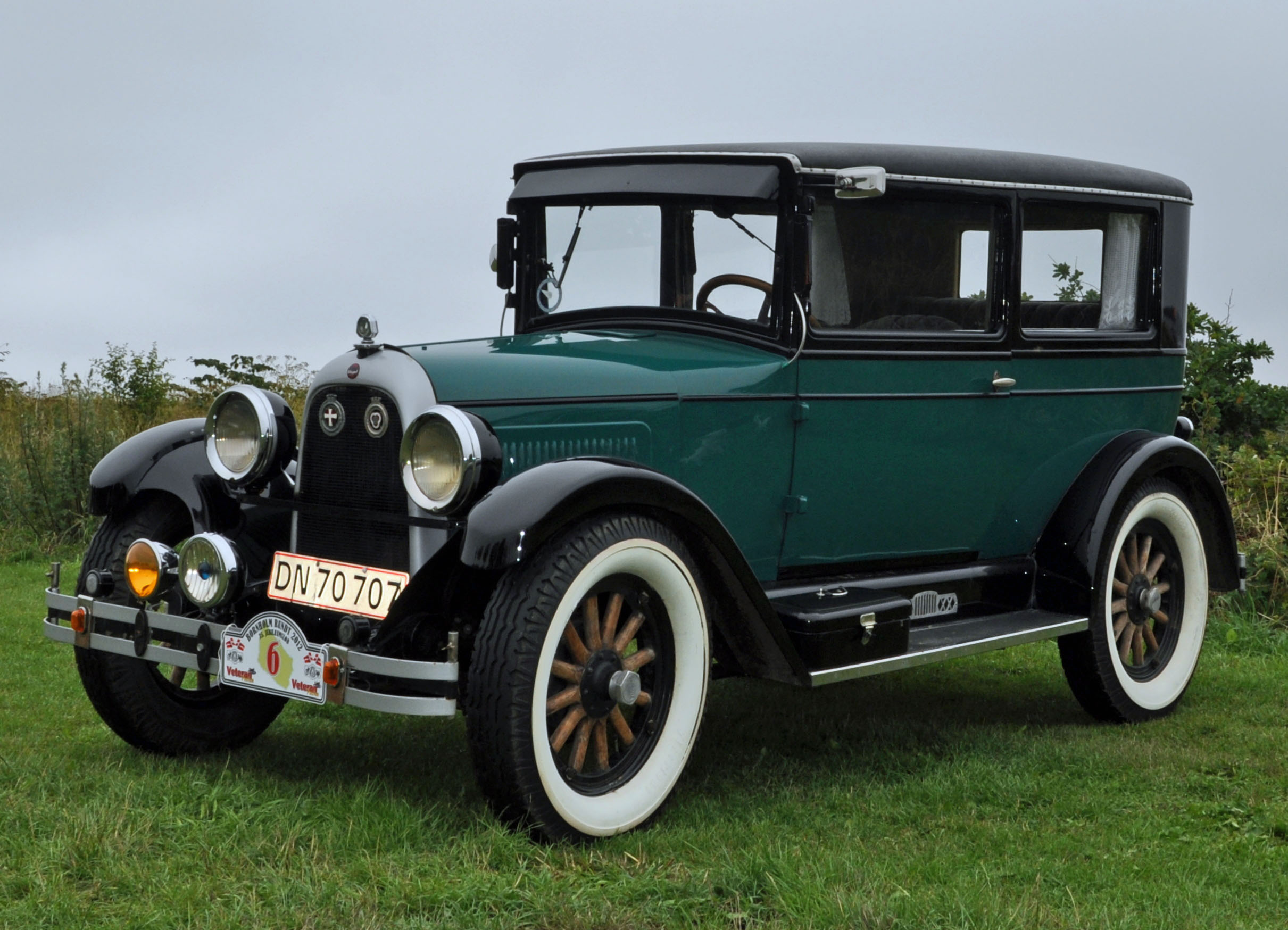 Das Foto zeigt einen Teilnehmer der Classic-Car-Race "Bornholm Rundt 2012" im Juli 2012 auf Bornholm, Dänemark. Whippet Overland